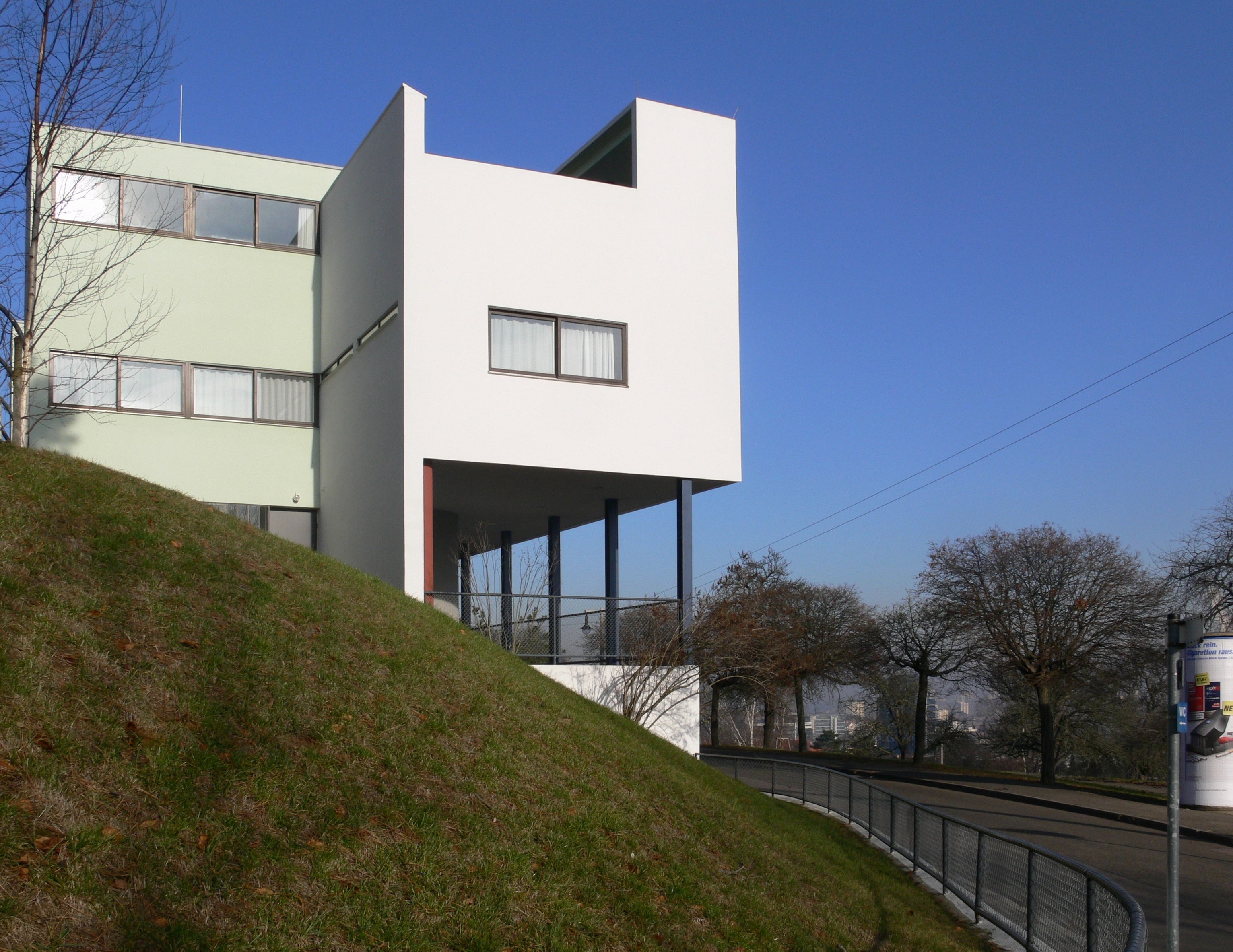 Stuttgart, Weißenhofsiedlung, Haus Le Corbusier